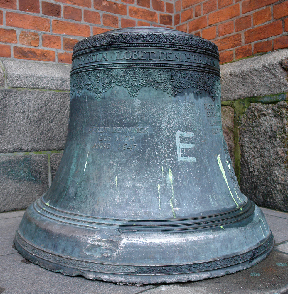 St. Petrikirche in Lübeck: Glocke aus einer Danziger Kirche. Inschrift: GERDT BENNINCK GOS MICH ANNO 1647. Anmerkung 2018: Zwischenzeitlich nach Polen restituiert.